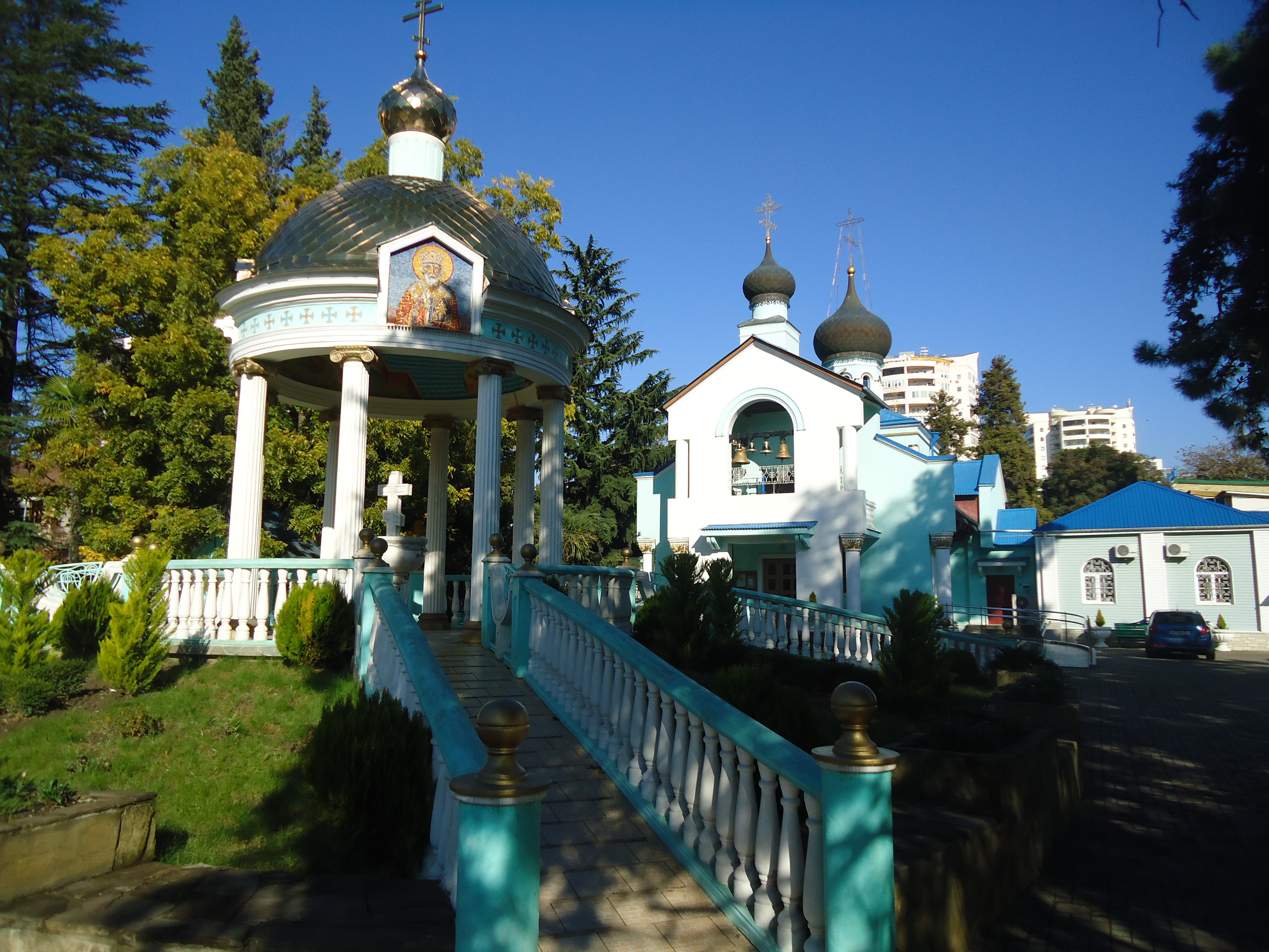 Храм Живоначальной Троицы в Адлере